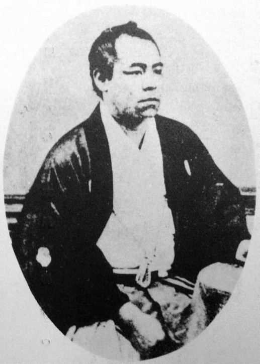 後藤象二郎 / Gotō Shōjirō (1838–97)